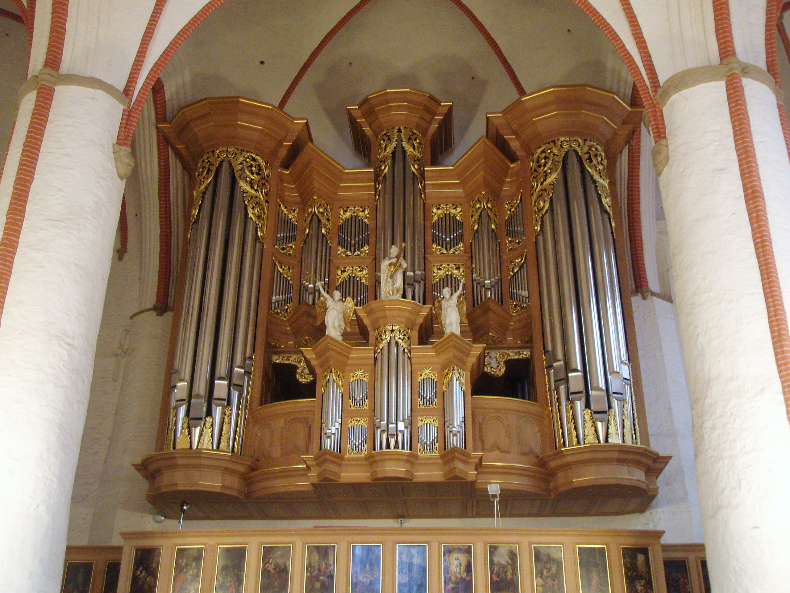 Schnitgerorgel in der St. Jacobikirche, Hamburg (Deutschland) This is a photograph of an architectural monument.